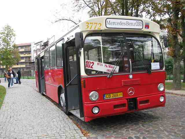 Mercedesie O305